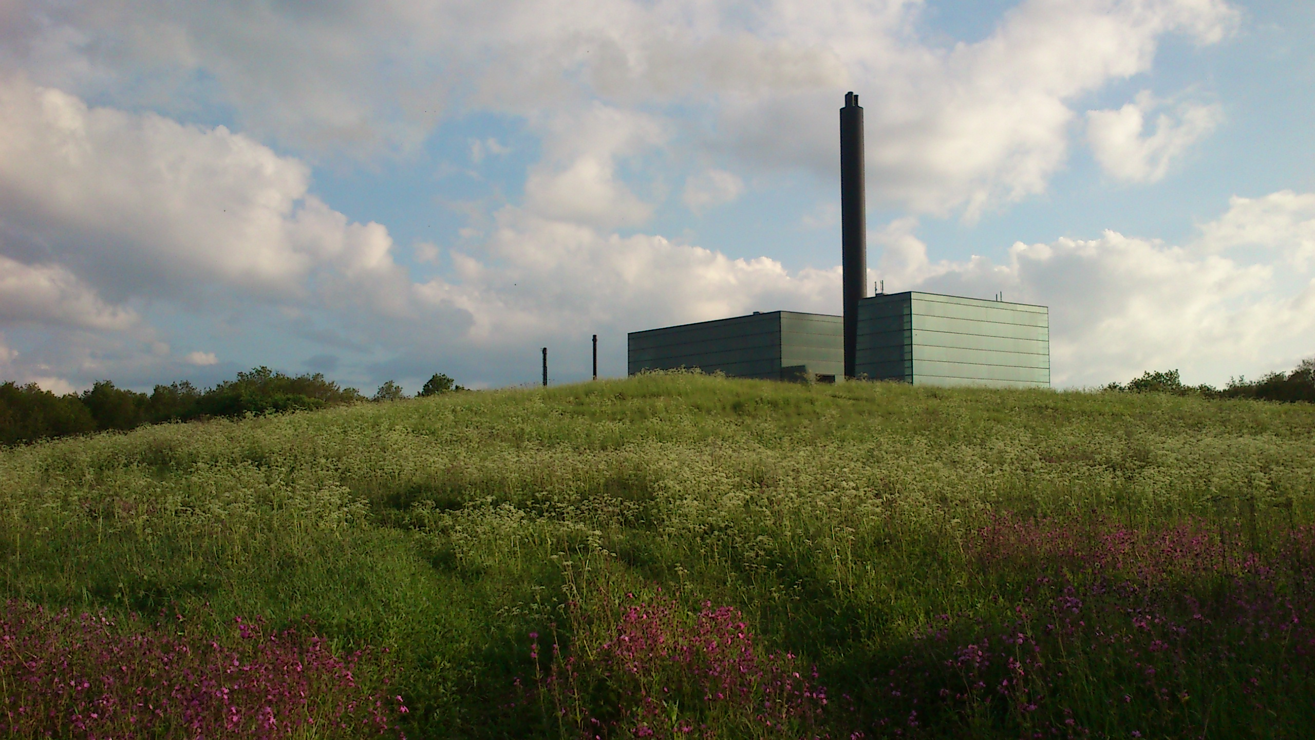 Lisbjerg Forbrændingen